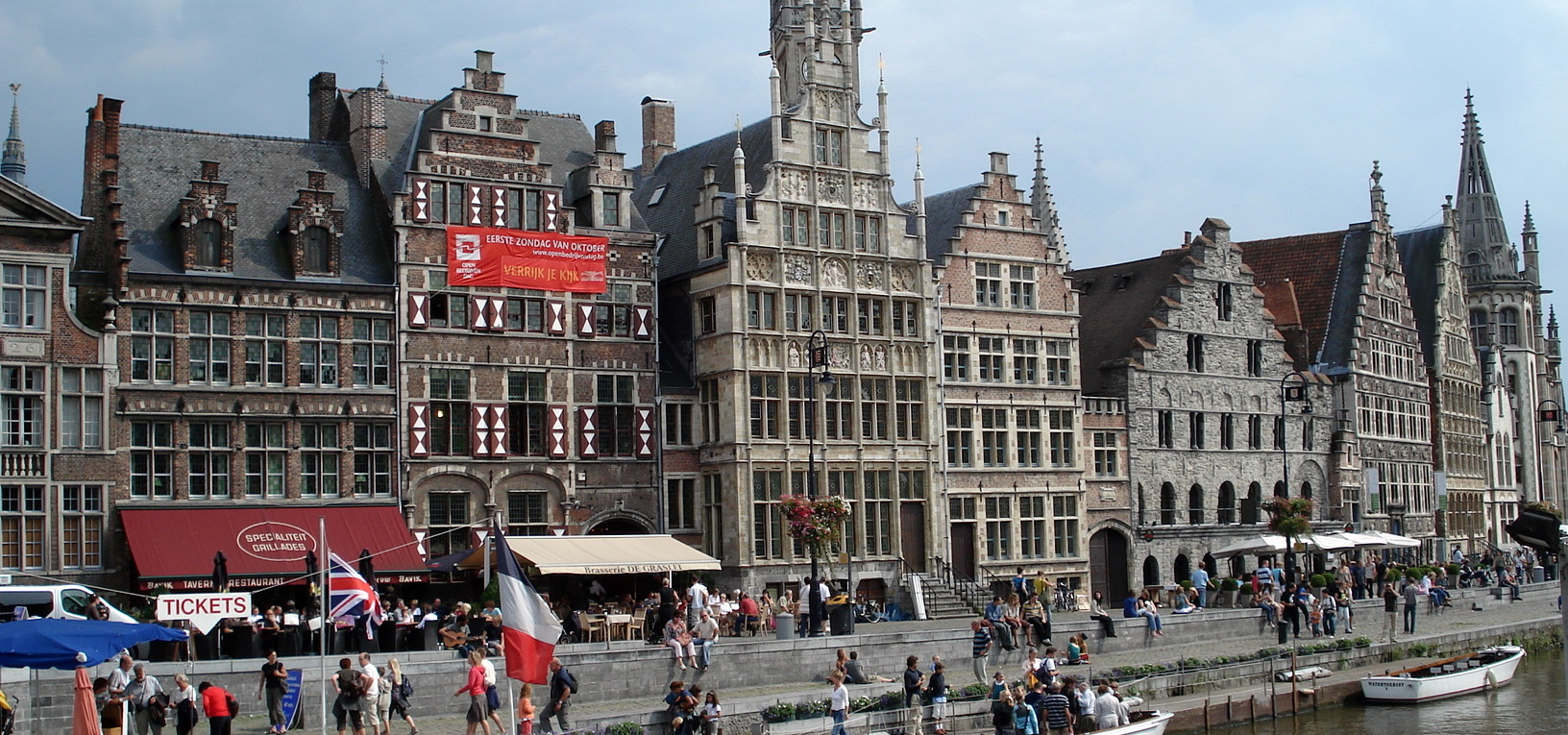 Graslei Gent Quai aux Herbes, Gand, Belgique